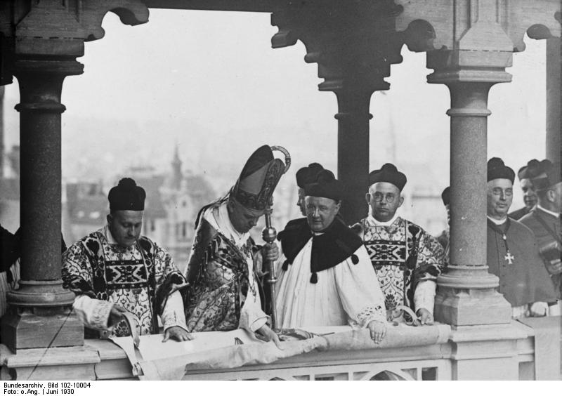 Der Auftakt der Aachener Heiligtumsfahrt ! Der Weihbischhof von Aachen legt am Vorabend von Johannes auf den Turmgalerien des Aachener Münsters unter grosser Feierlichkeit die mit Wappen und bildlichen Darstellungen geschmückten Tücher aus, welche während des hohen Mittelalters von dem Volke in Ihrer Wallfahrtszeit vorangetragen wurden.